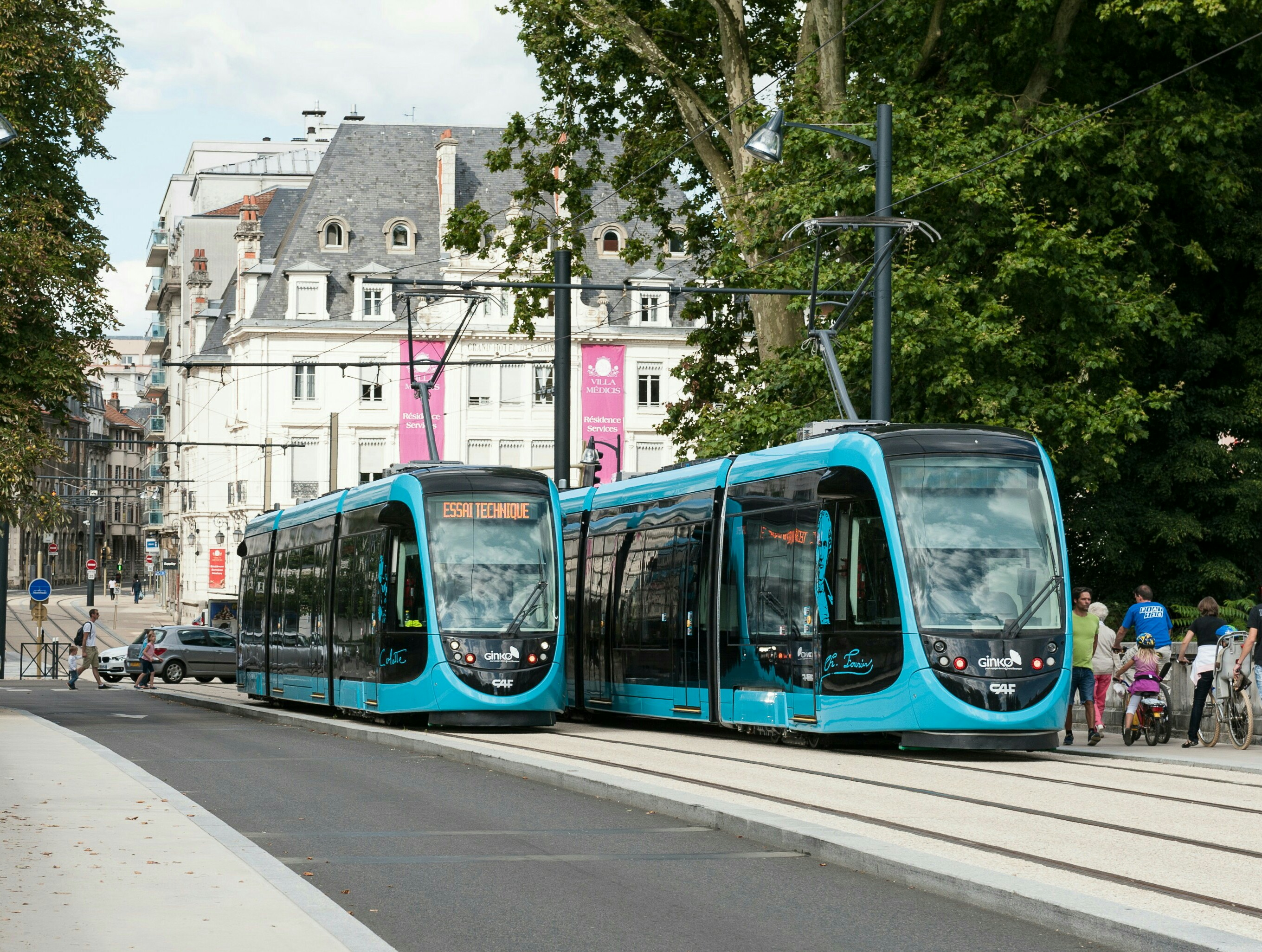 Deux tramways CAF se croisent sur le Pont de la République sur le Doubs, à Besançon Photo prise le 19 août 2014